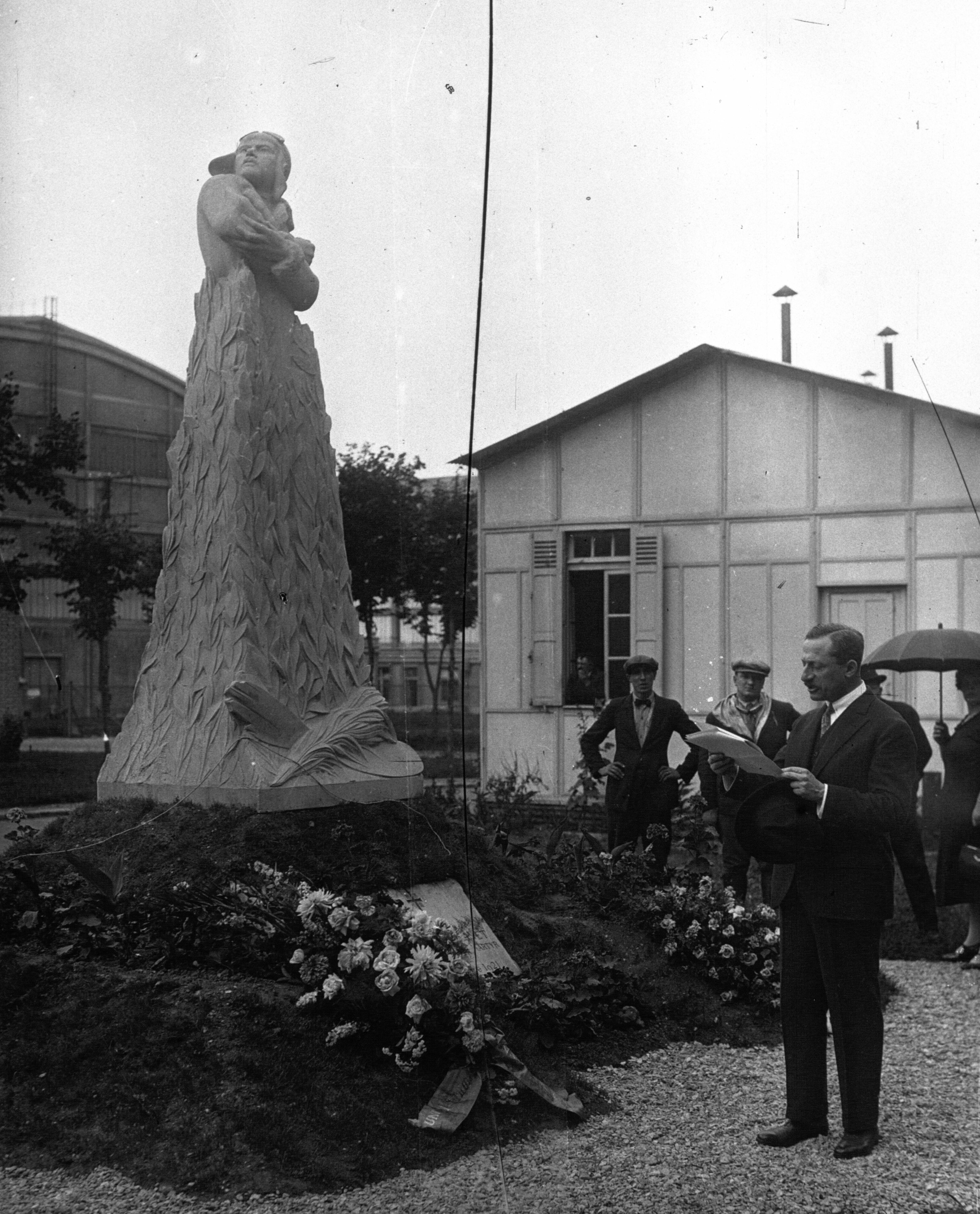 Le Bourget : inauguration du monument de Romanet : discours de Mr Bokanowski : photographie de presse